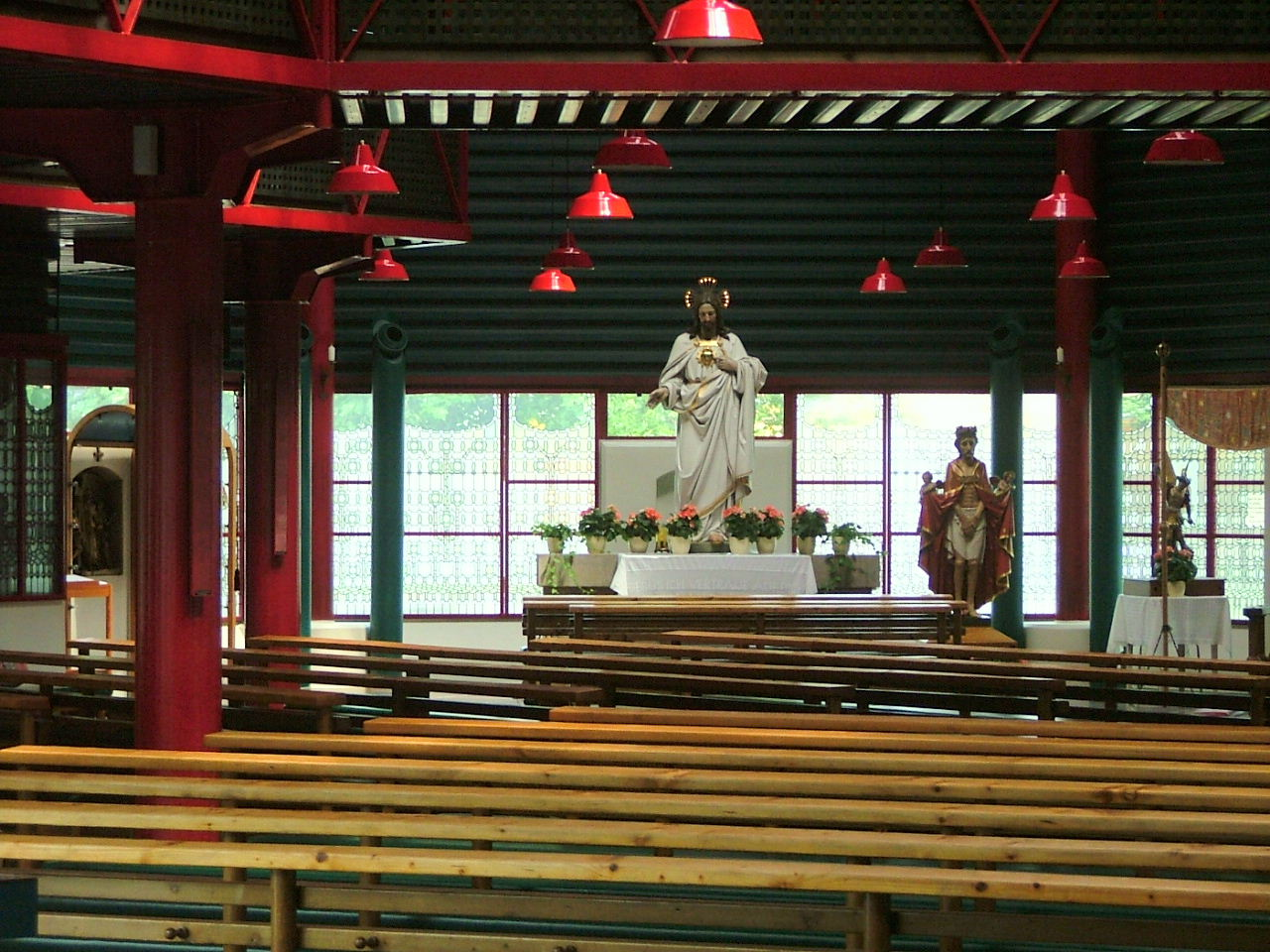 Wigratzbad